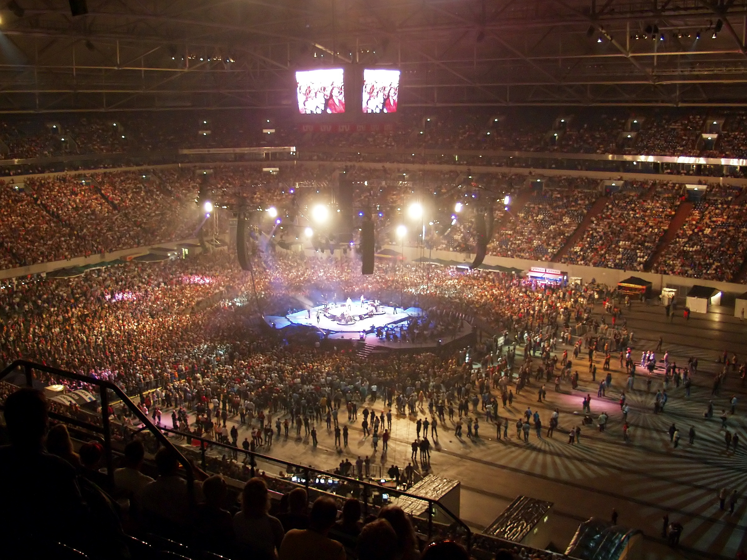 Stadion Arena AufSchalke (Gelsenkirchen) Innenaufnahme - beim Pur-Konzert